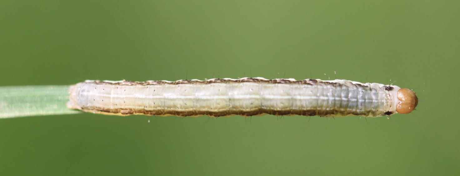 Raupe der Bräunlichgelben Grasbüscheleule (Apamea scolopacina) am 17. Mai 2020 in einem Waldgebiet nahe Stuttgart